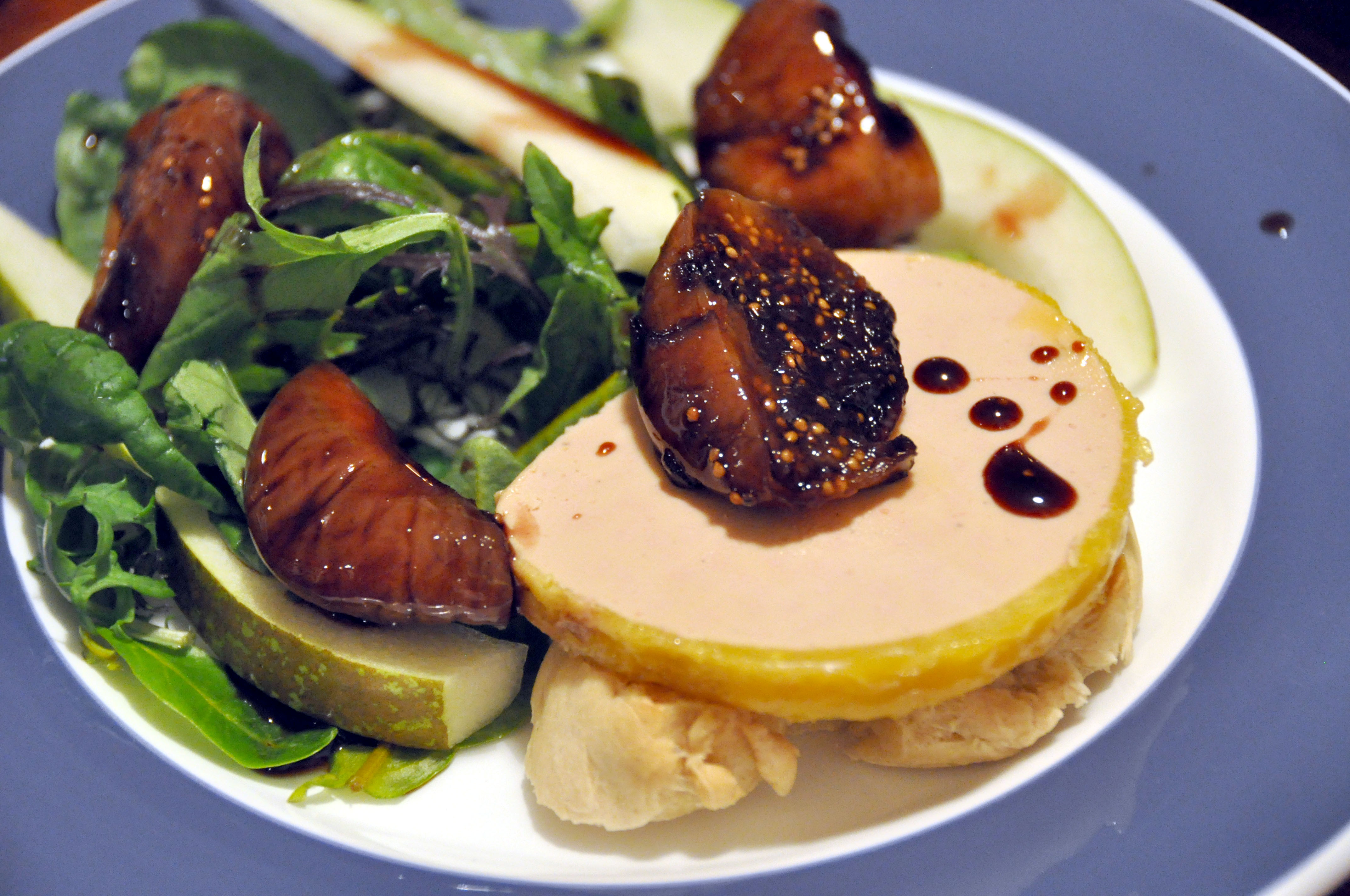 Foie gras med flute, salat, pære og rødvinssyltede figner